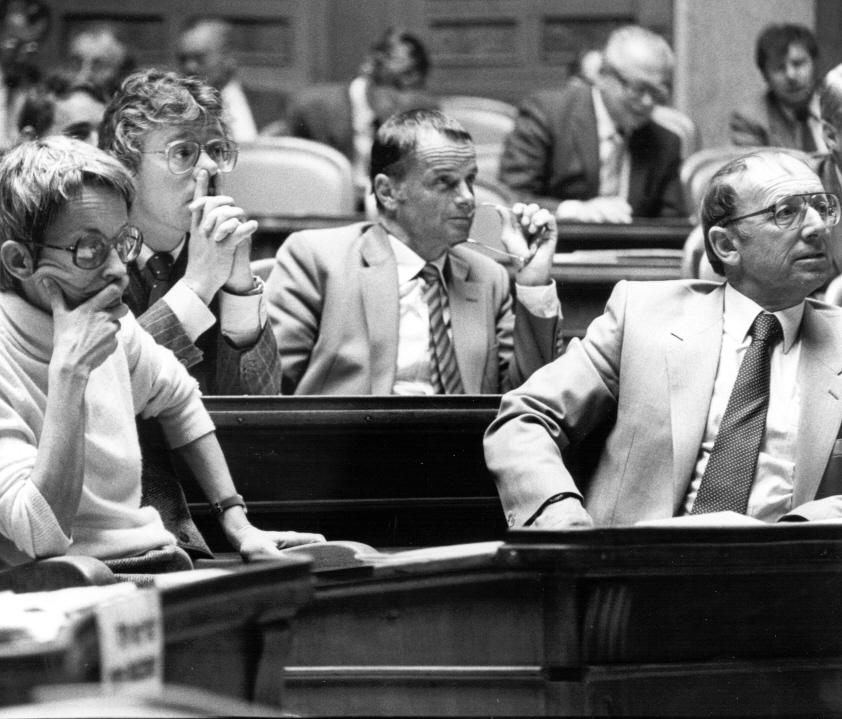 Einige Mitglieder der Fraktion des Landesrings der Unabhängigen (LdU) im Schweizer Nationalrat. Von links: Verena Grendelmeier, Franz Jaeger, Walter Biel und Hansjürg Weder